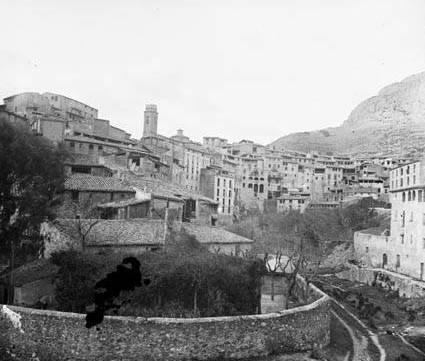 Imatge